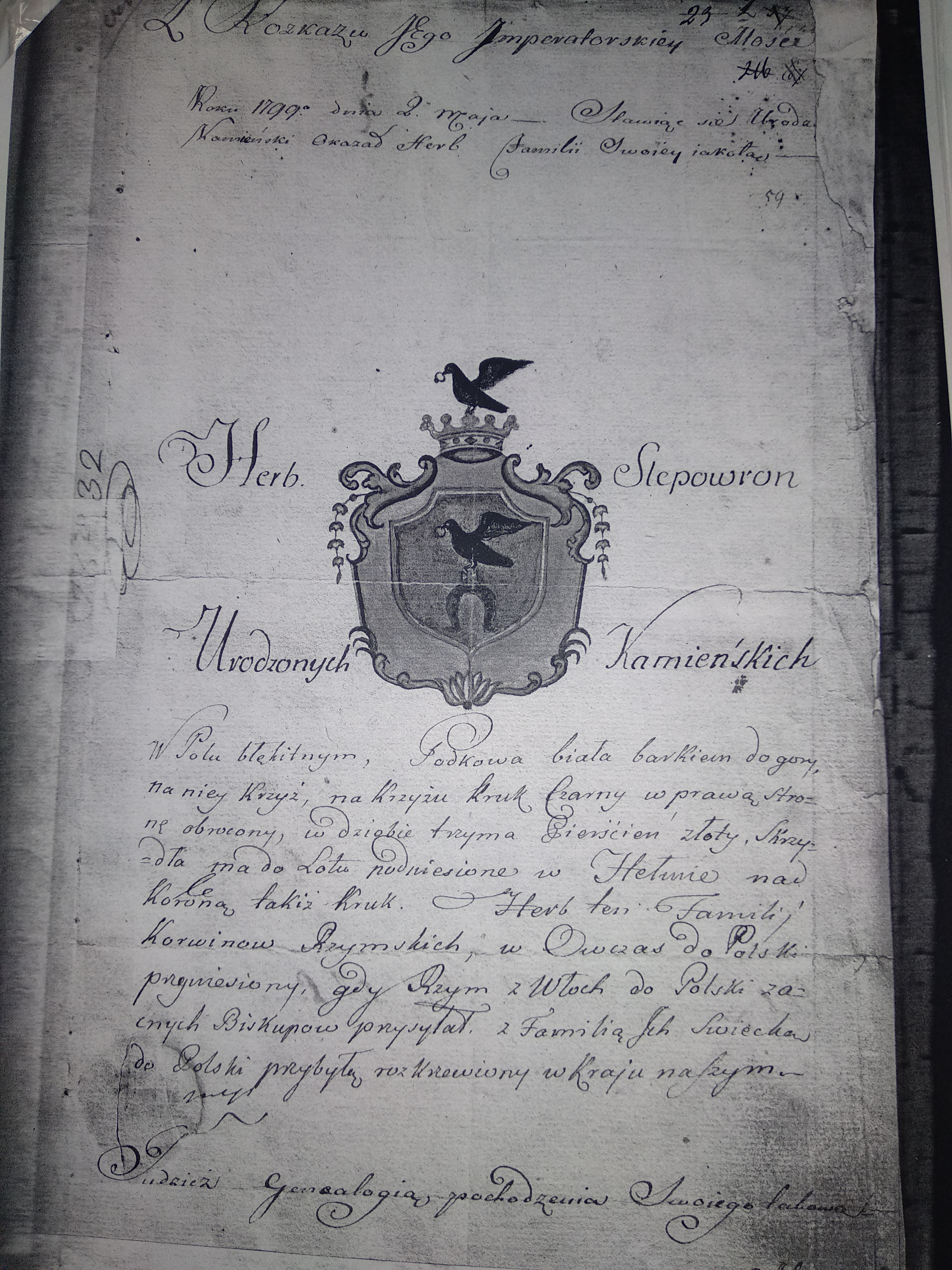 Герб Слеповрон указан в родословной семьи Каминских. Житомирский архив украины Ф. 146, оп.1 дело, 2701, л. 2.